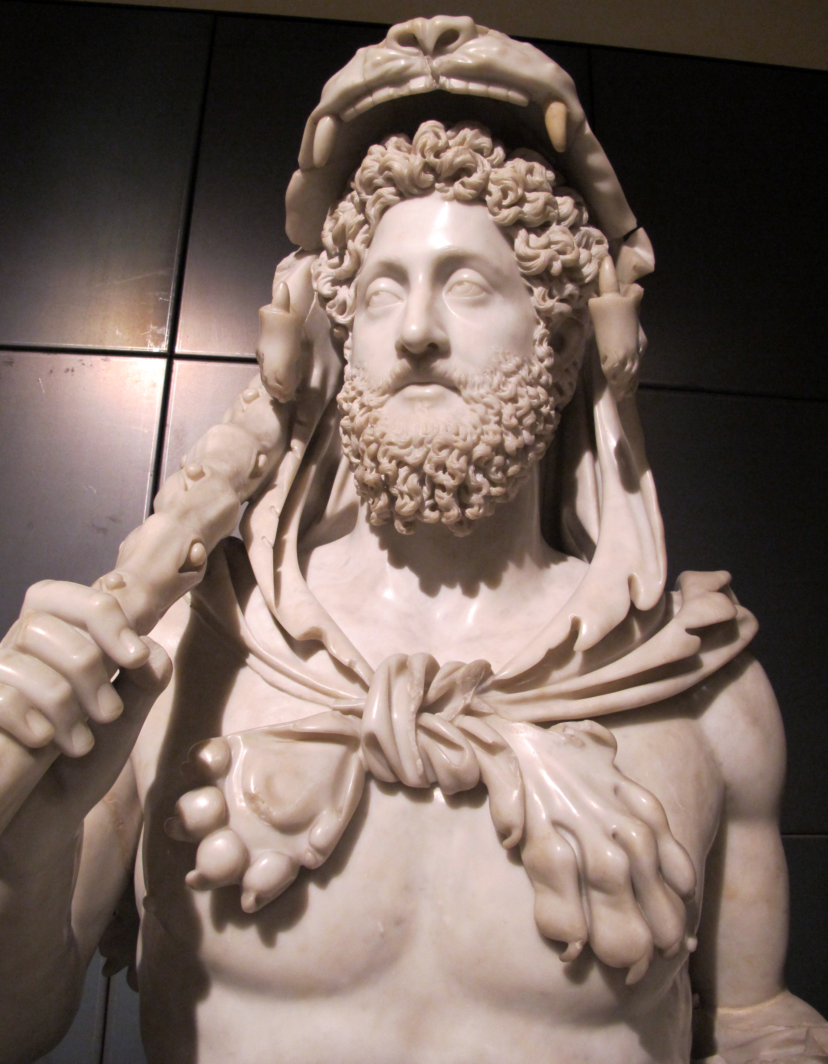 Statue antiche, musei Capitolini, Roma